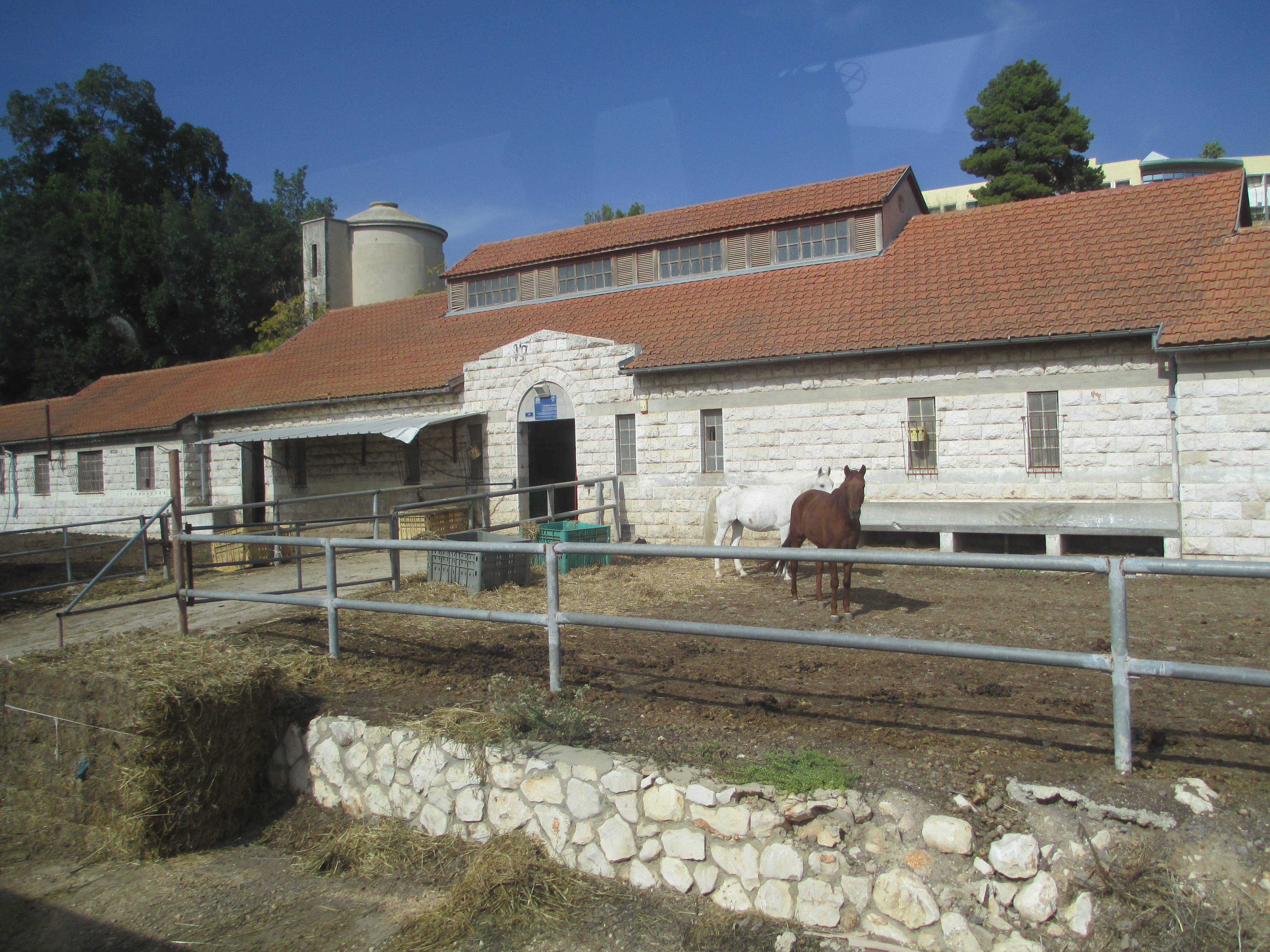 בנין הרפת הישנה והאורווה בבית הספר כדורי